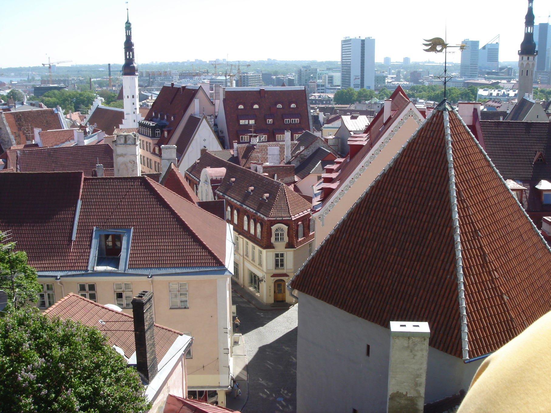 Látkép Toompeából az Alsóvárosra (Tallinn, Észtország). Jól látható a régi városház tornya.